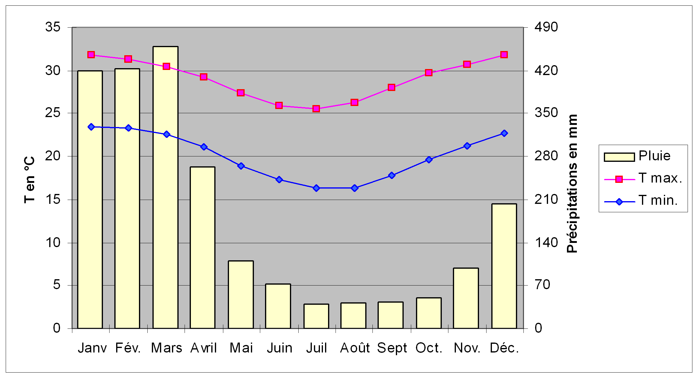 Diagramme climatique de la ville de Cairns (Australie), comprenant deux courbes, représentant les températures maximales et minimales, et un histogramme, représentant la pluviométrie, pour les douze mois de l'année.